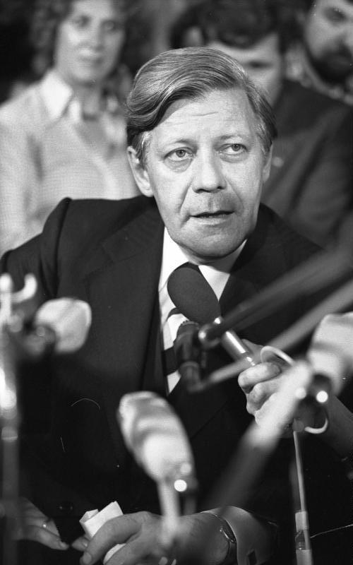 Bundestagswahl- Wahlnacht, Bundeskanzler Helmut Schmidt stellt sich den Fragen der Fernsehjournalistin Fides Krause-Brewer im Bundeskanzleramt